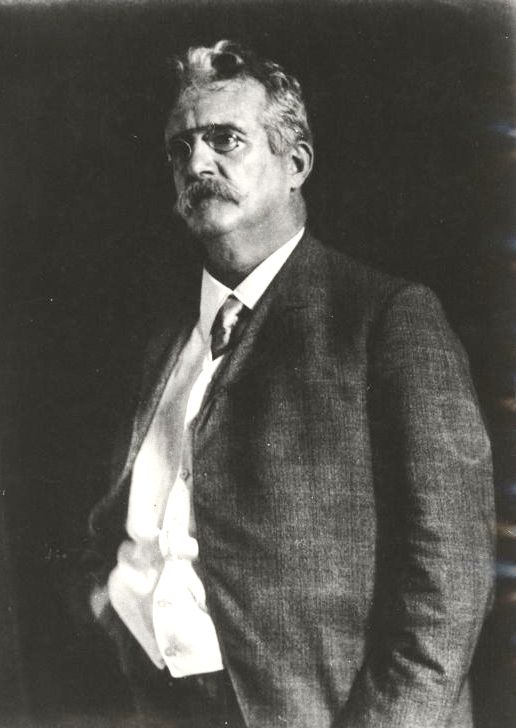 Max Lenz. Aufnahme von Rudolph Dührkoop.[1]